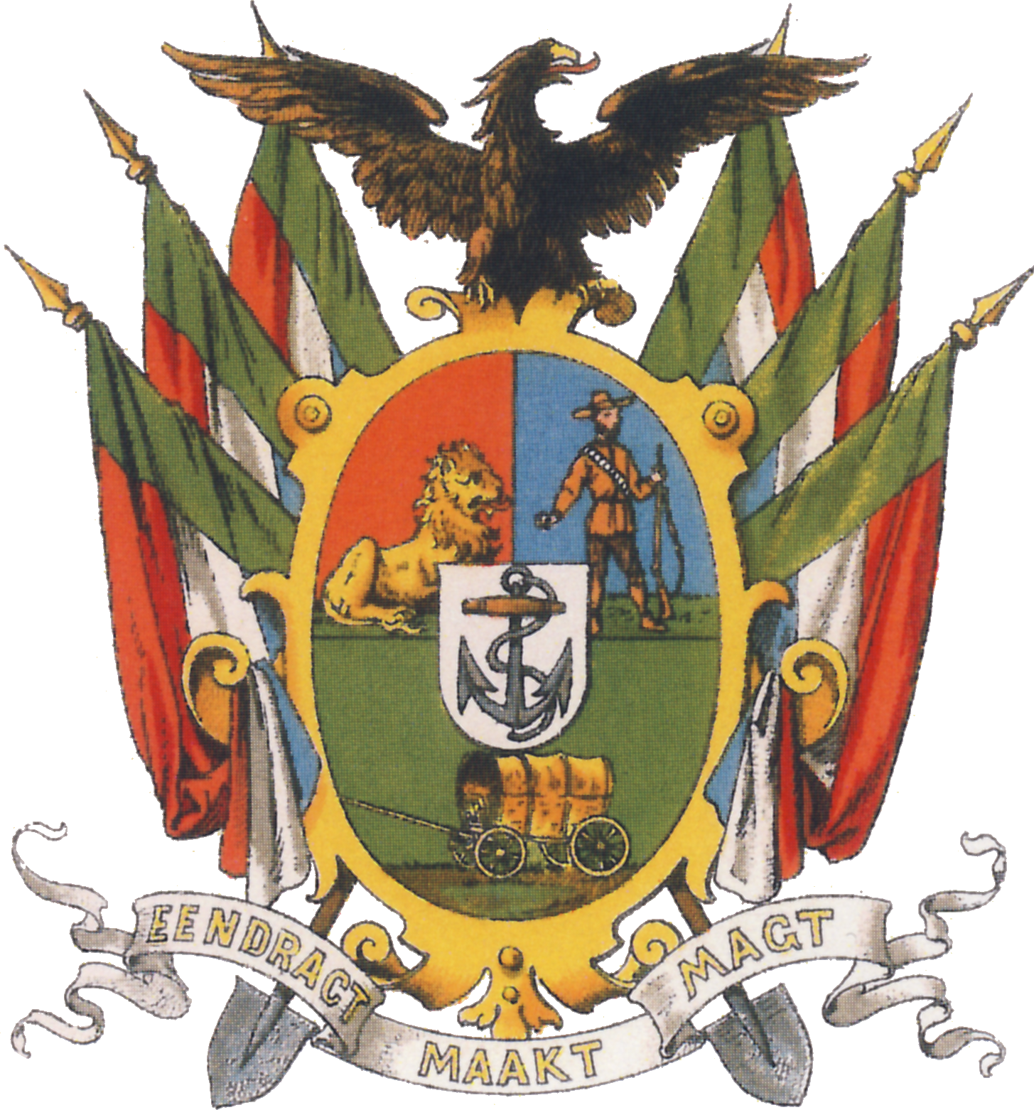 Wappen der Südafrikanischen Republik (Transvaal)